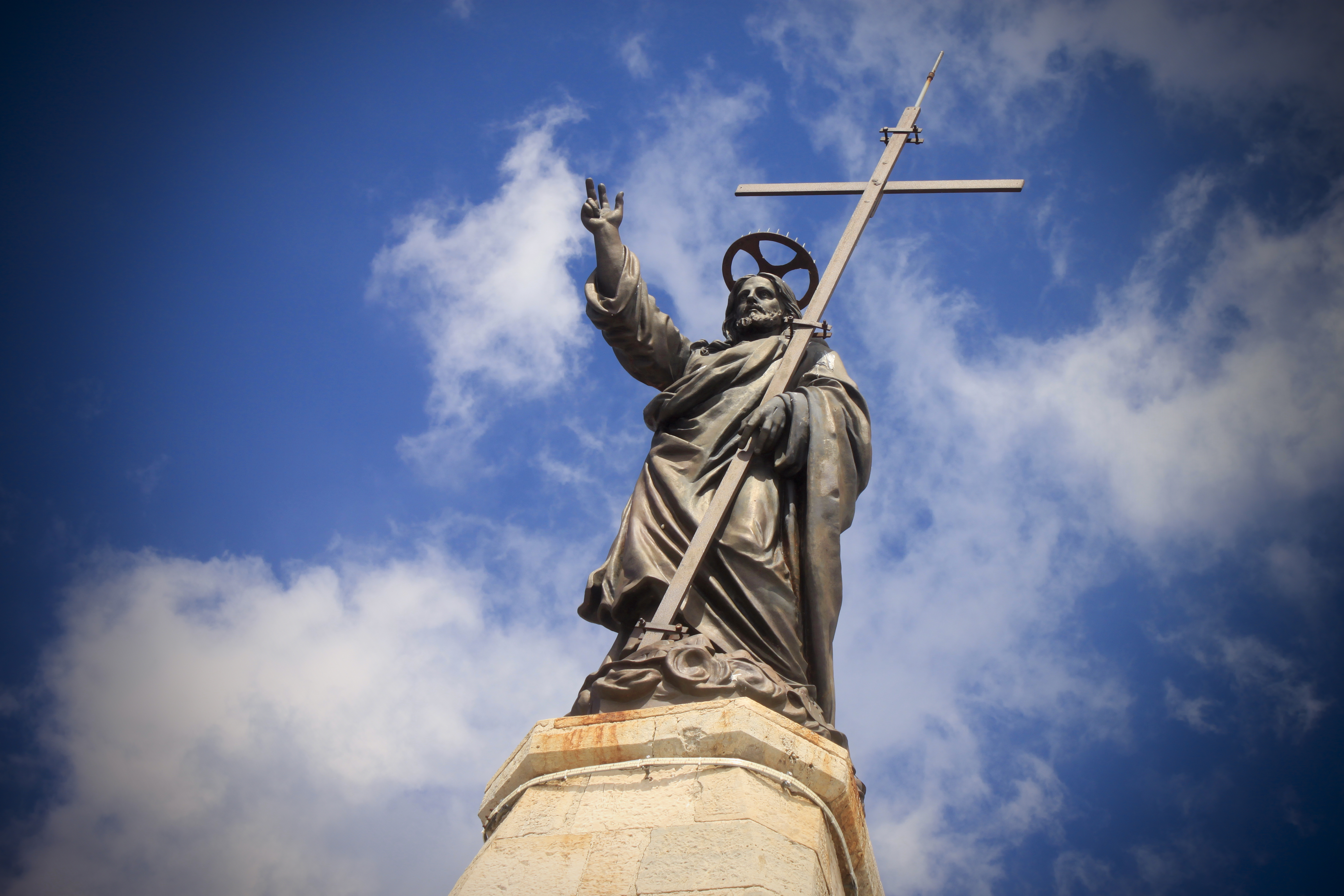 Fotografia di Gabriele Altimari